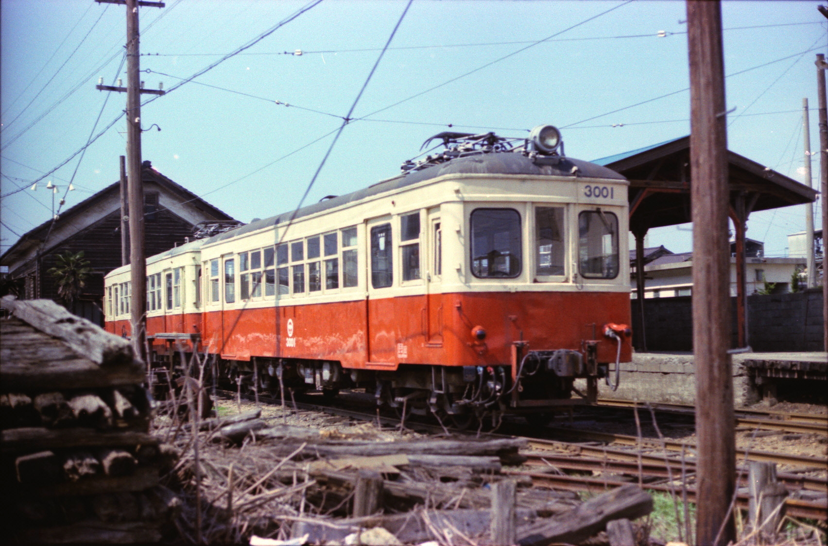 北陸鉄道小松線 小松駅付近 モハ3000形電車